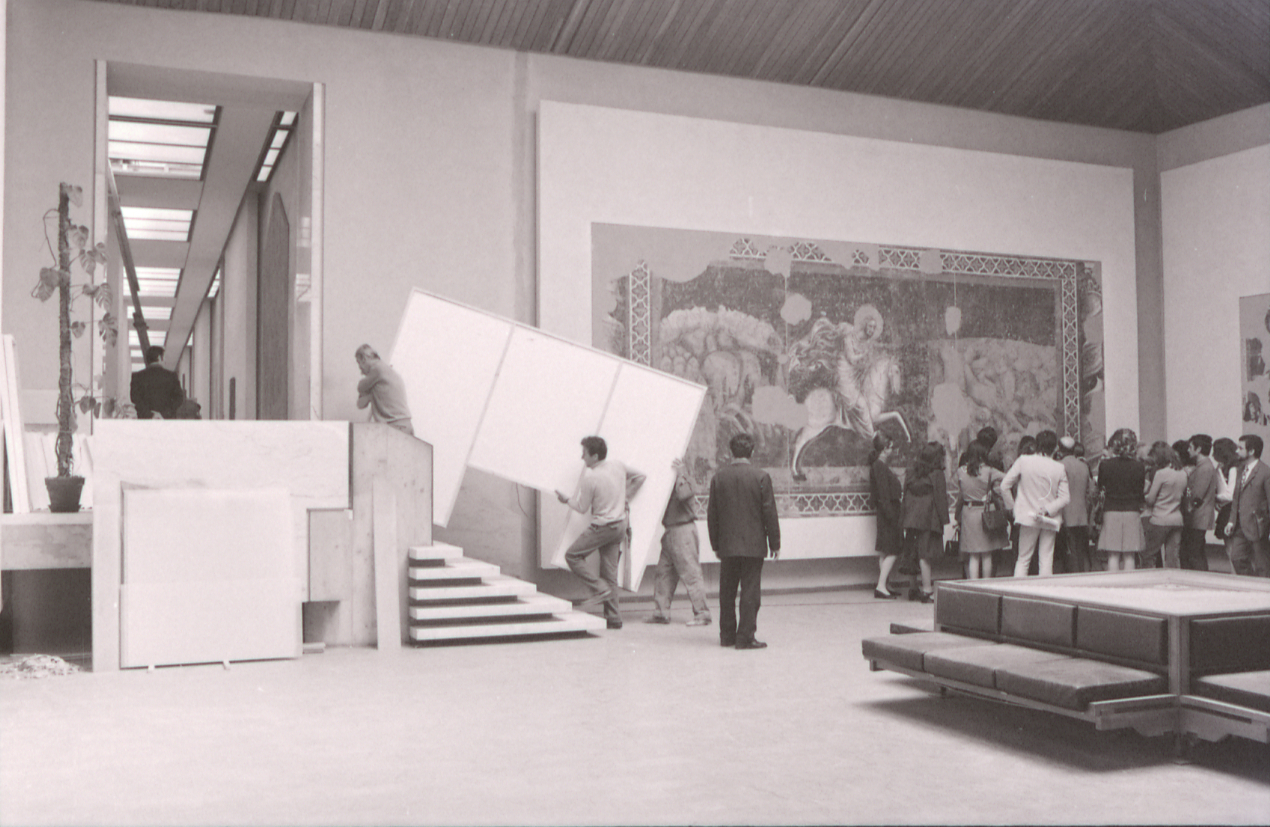 Servizio fotografico : Bologna, 1972 / Paolo Monti. - Strisce: 6, Fotogrammi complessivi: 32 : Negativo b/n, gelatina bromuro d'argento/ pellicola 35 mm. - ((Sul portanegativi: NIKMAT TRI-X. - Occasione: Documentazione delle nuove sale della Pinacoteca. - Fonte: Agenda di Paolo Monti: Leica 1501-3000 Controllo numerazione (1950-1978), presso Archivio Paolo Monti. - Fonte: Monografia di Emiliani Andrea, Gaeta Bertelà Giovanni: Vent'anni di lavoro per la Pinacoteca nazionale di Bologna, Bologna, Edizioni Alfa (1973). - Fonte: Fattura di Paolo Monti: IV. Commesse/ Fattura n. 26 (1973/12/16), presso Archivio Paolo Monti